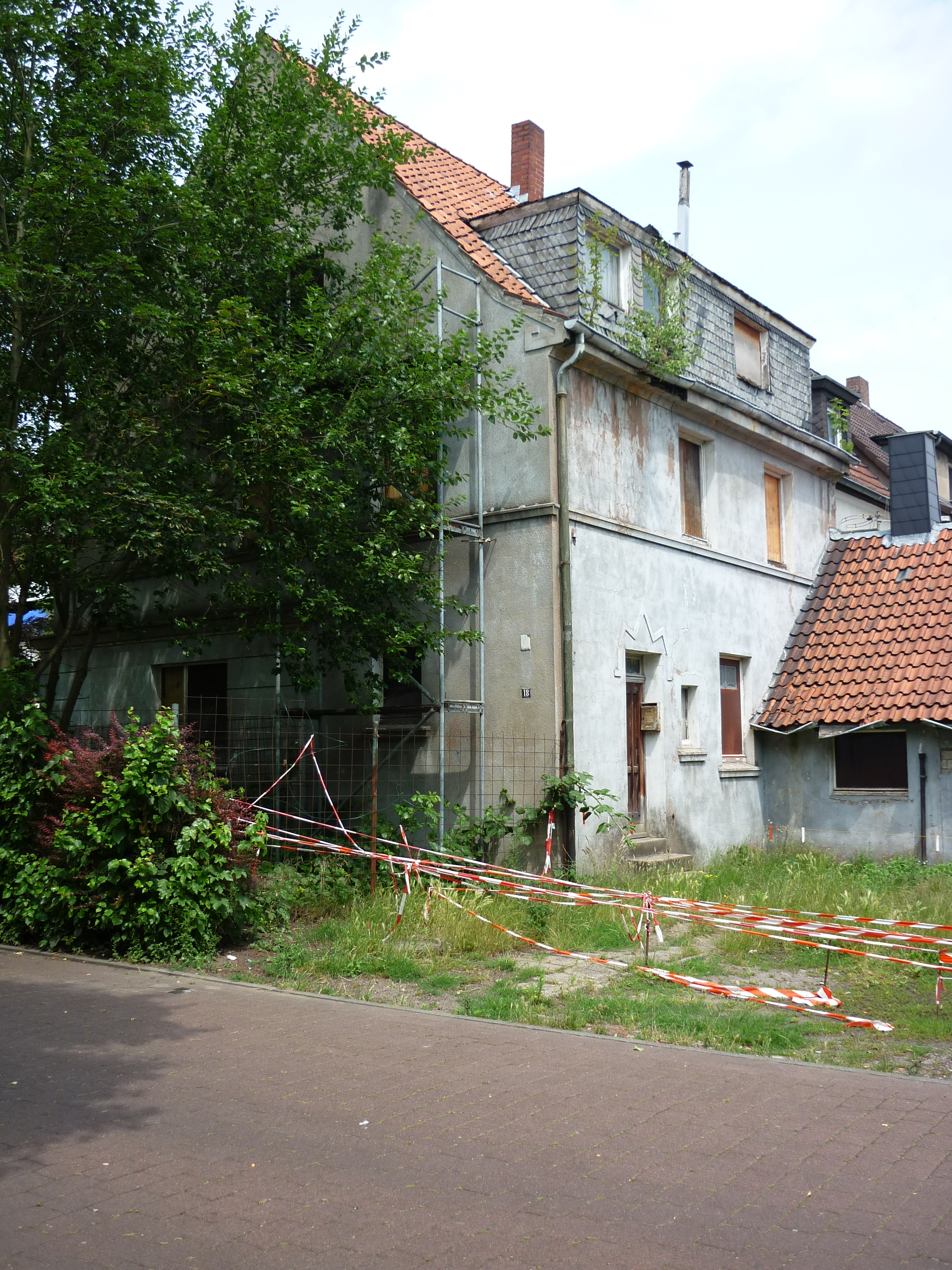 Stolpersteinlage Datteln Mittelstraße 18